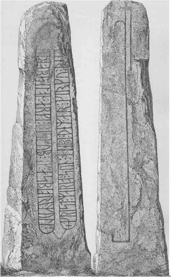 Norra Åsums kyrkas runsten, placerad i vapenhuset söder om ingången till mittskeppet. Text: Kristus, Marias son, hjälpe dem som gjorde denna kyrka, ärkebiskop Absalon och Esbern Mule. DR 347